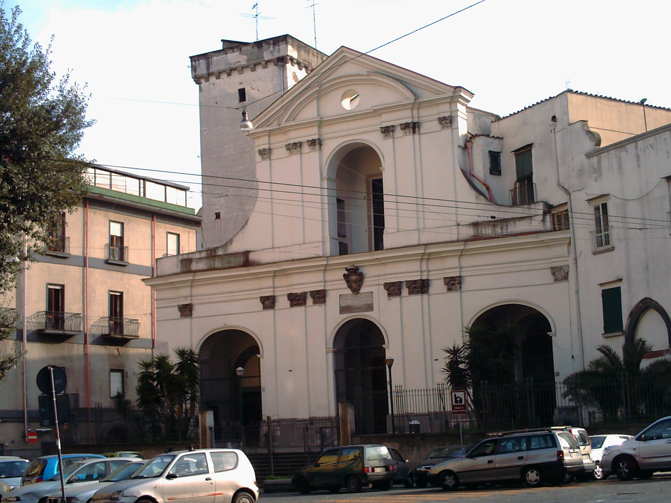 Facciata Sant'Antonio Abate (Napoli)